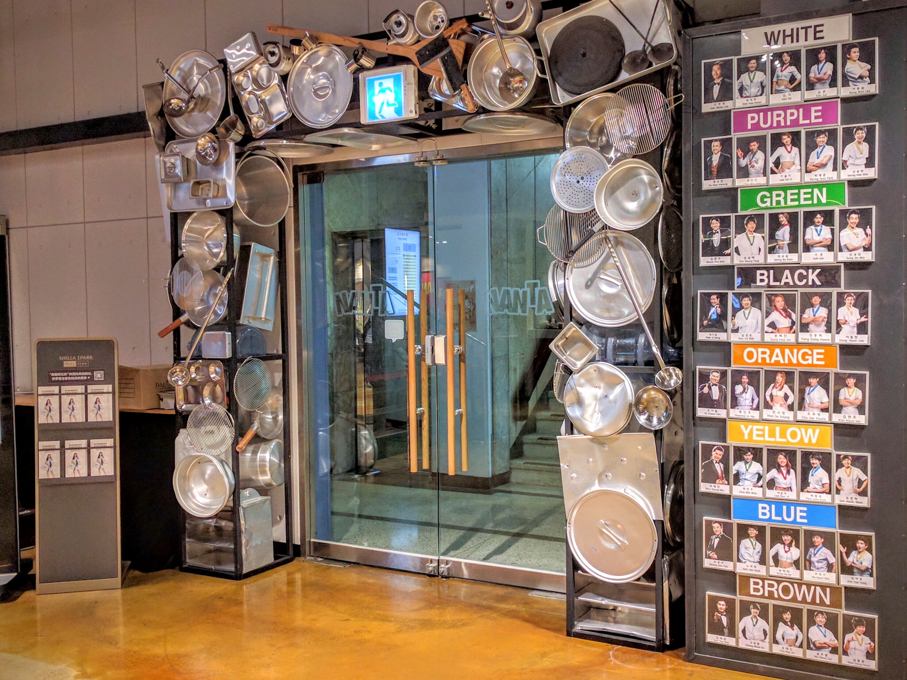 IMG_20160926_153952